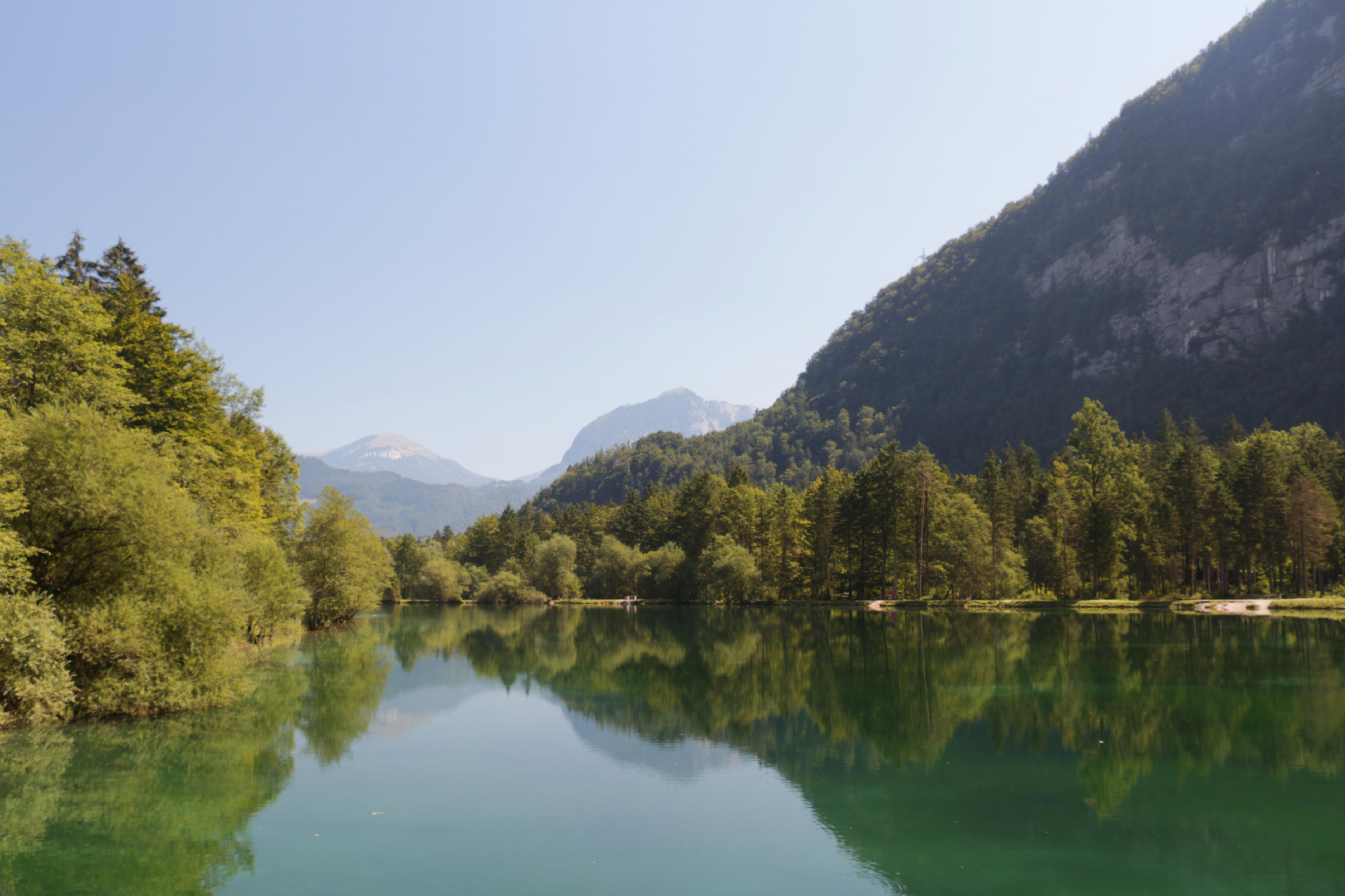 Der Obere Bluntausee im Bluntautal, Marktgemeinde Golling, Bezirk Hallein, Land Salzburg; Blick Richtung Osten